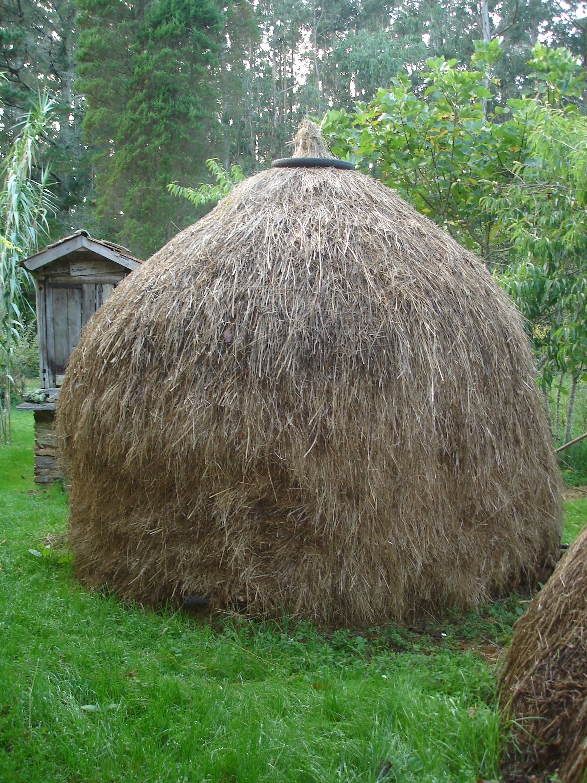 Palleiro en Cerdido, Galicia